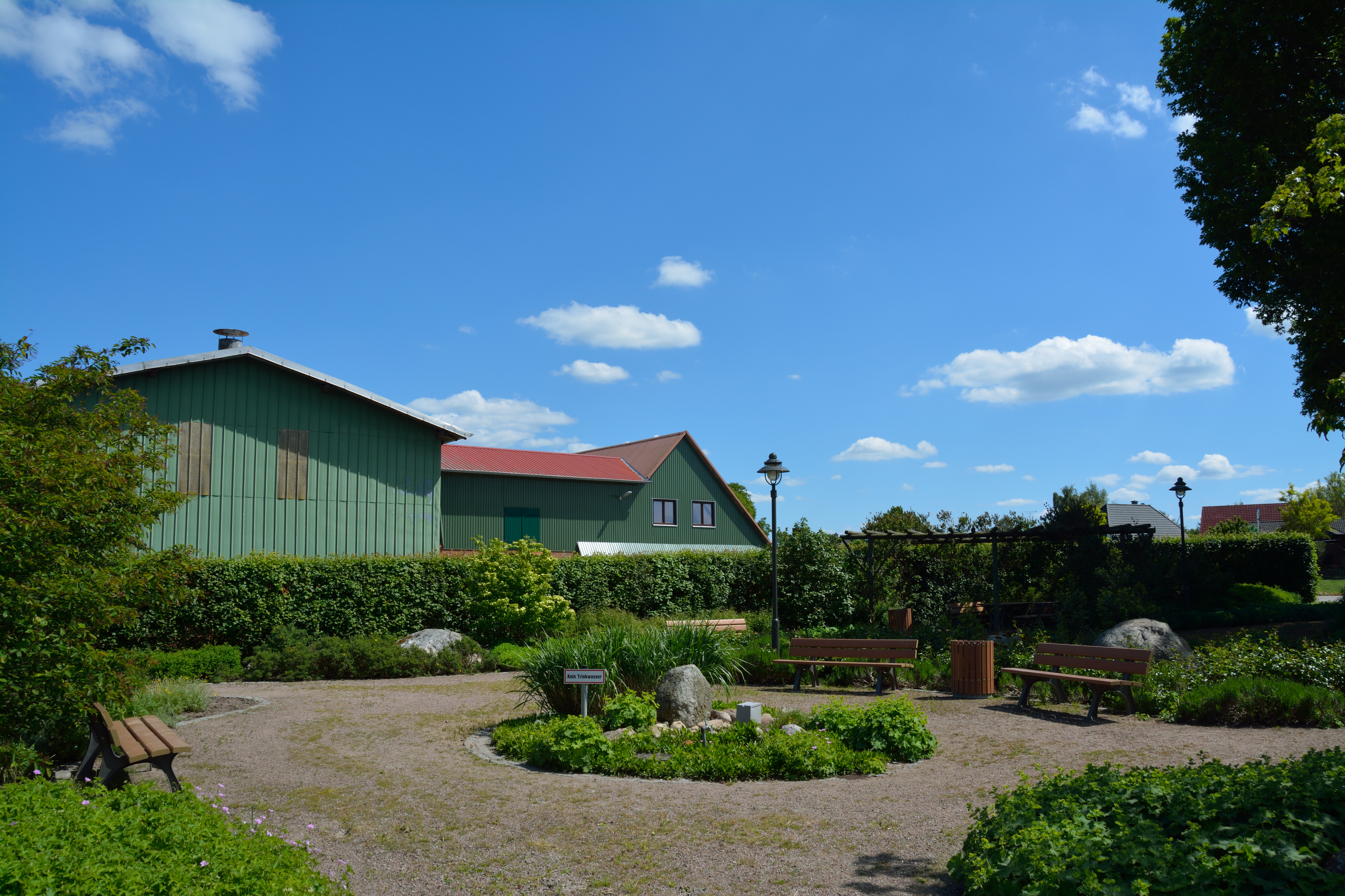 Der Dorfplatz neben dem Ehrenmal in Puls